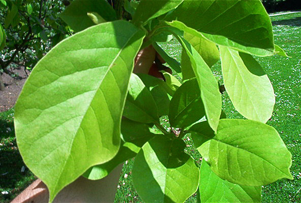 Laubblätter (Magnolia sp.)